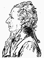 Källa: Svenskt Biografiskt handlexikon [1]